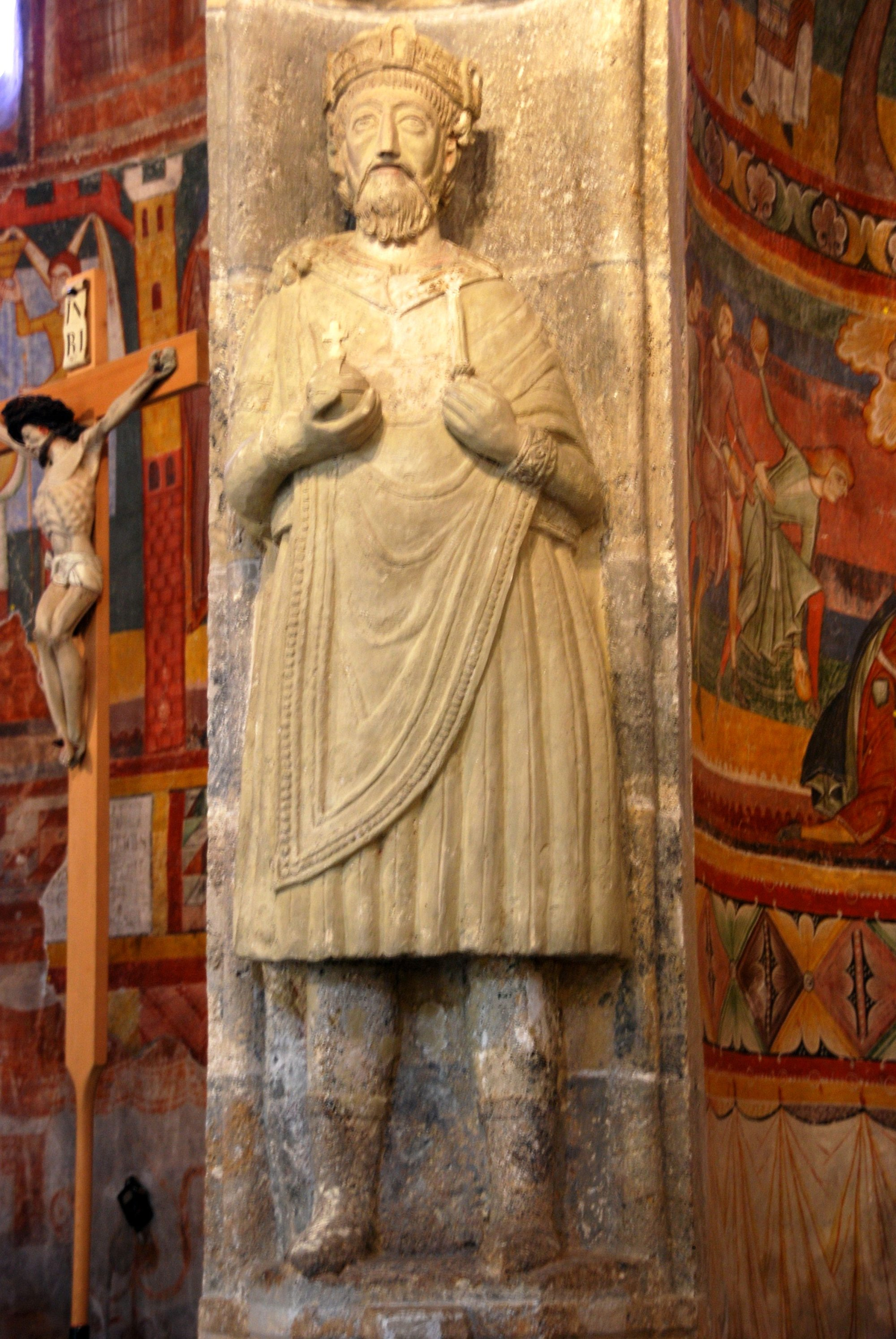 Skulptur Karls des Großen in der Klosterkirche